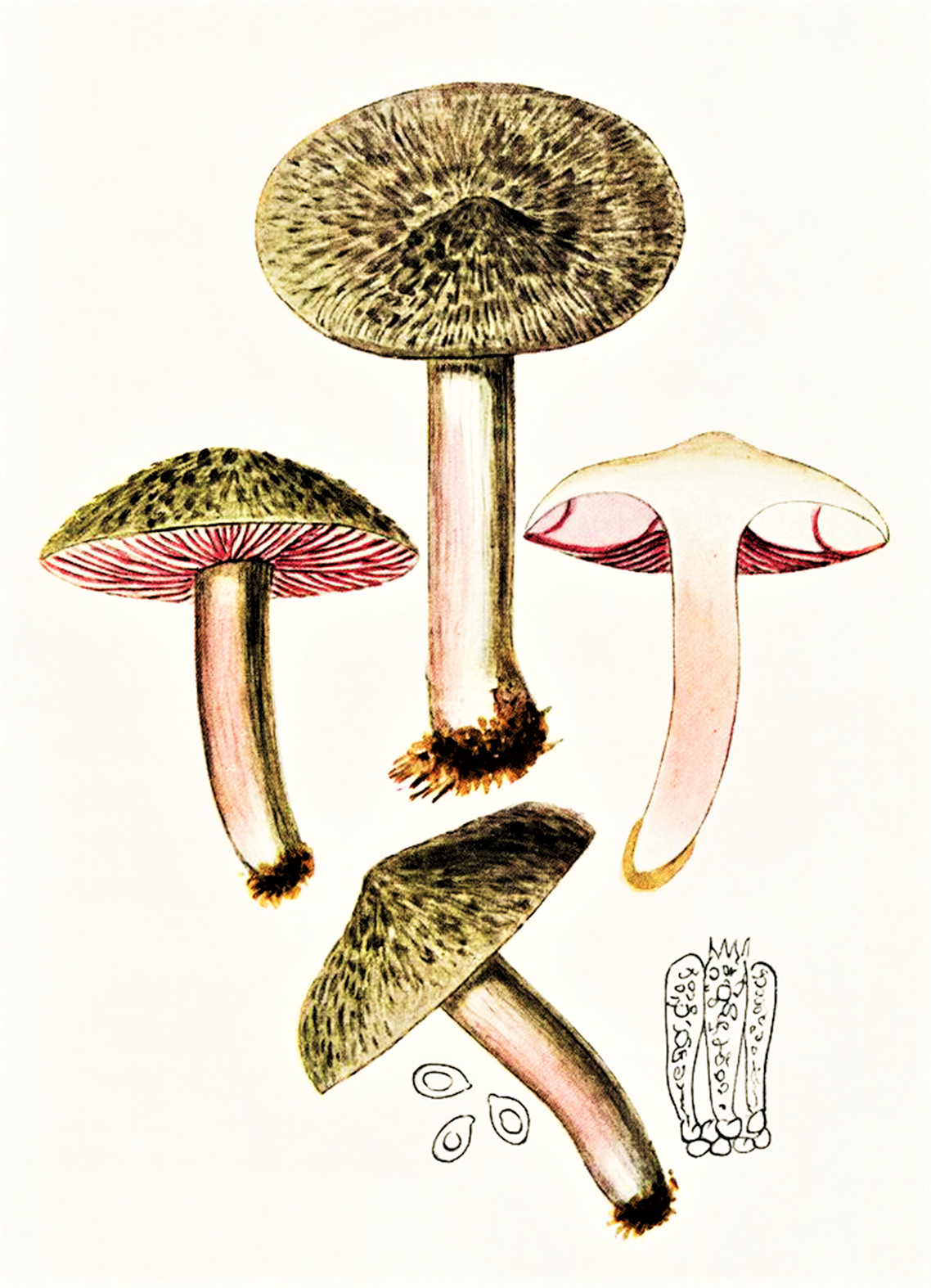 Bres.: Tricholoma orirubens Quél. (1872)